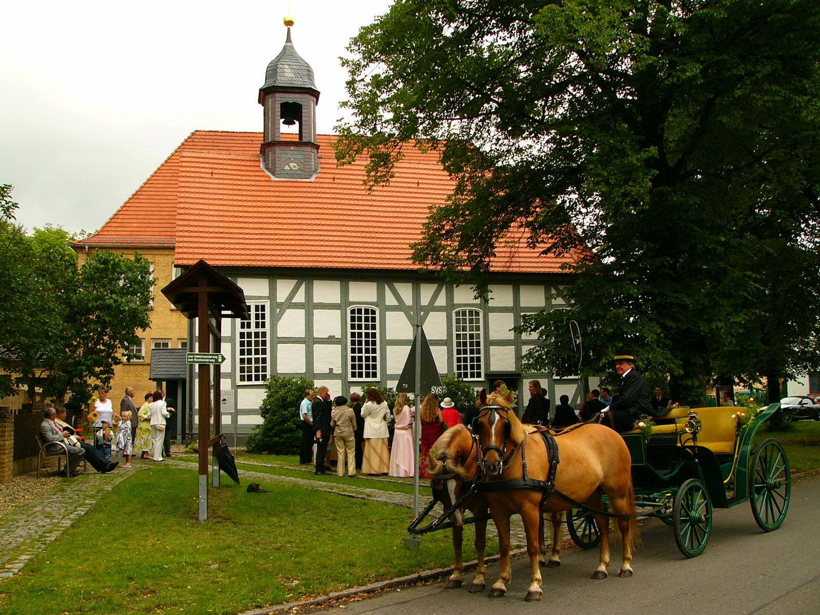 Evangelische Lutherkirche, Schwarzheide, Land Brandenburg, Deutschland